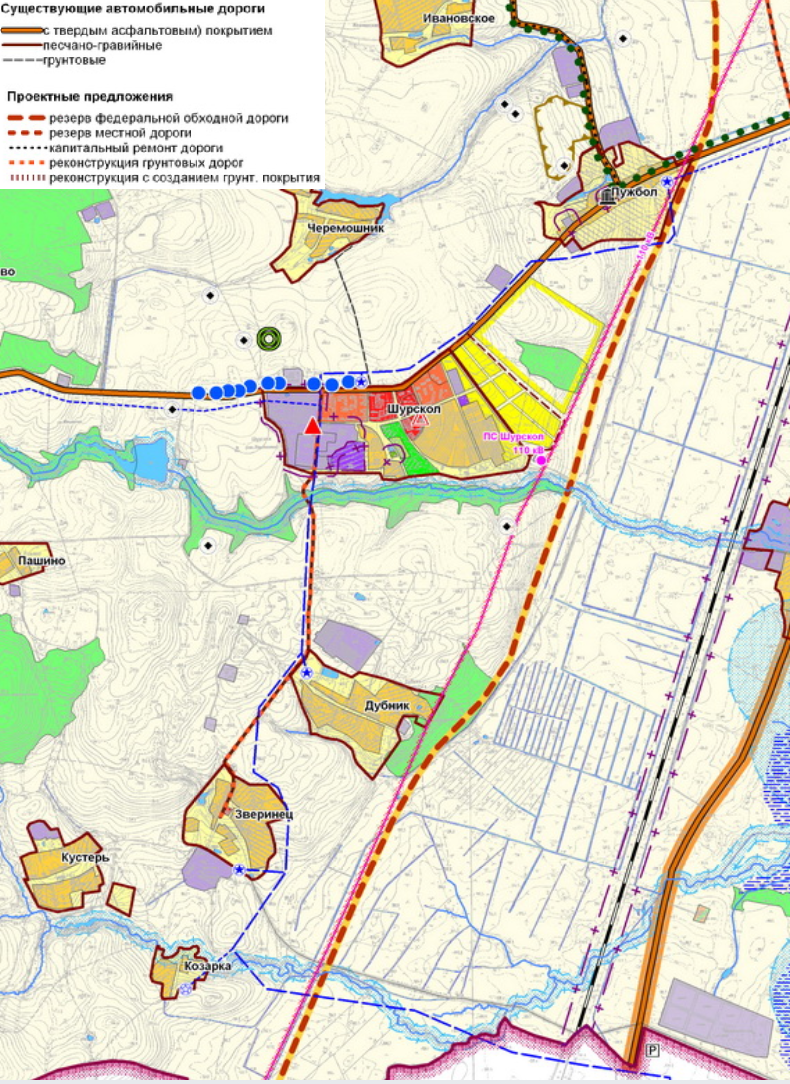 Проект дублера автотрассы М8 «Холмогоры», проходящий по сельскому поселению Ишня (обозначен жирной пунктирной коричневой линией). Дублер проходит мимо населенных пунктов с.п. Ишня: Шурскол, Ишня, Пужбол, Дубник, Зверинец, Казарка, Кустерь, Ивановское, Поддыбье, Демьяны, Рельцы, Уваиха, Хонятино